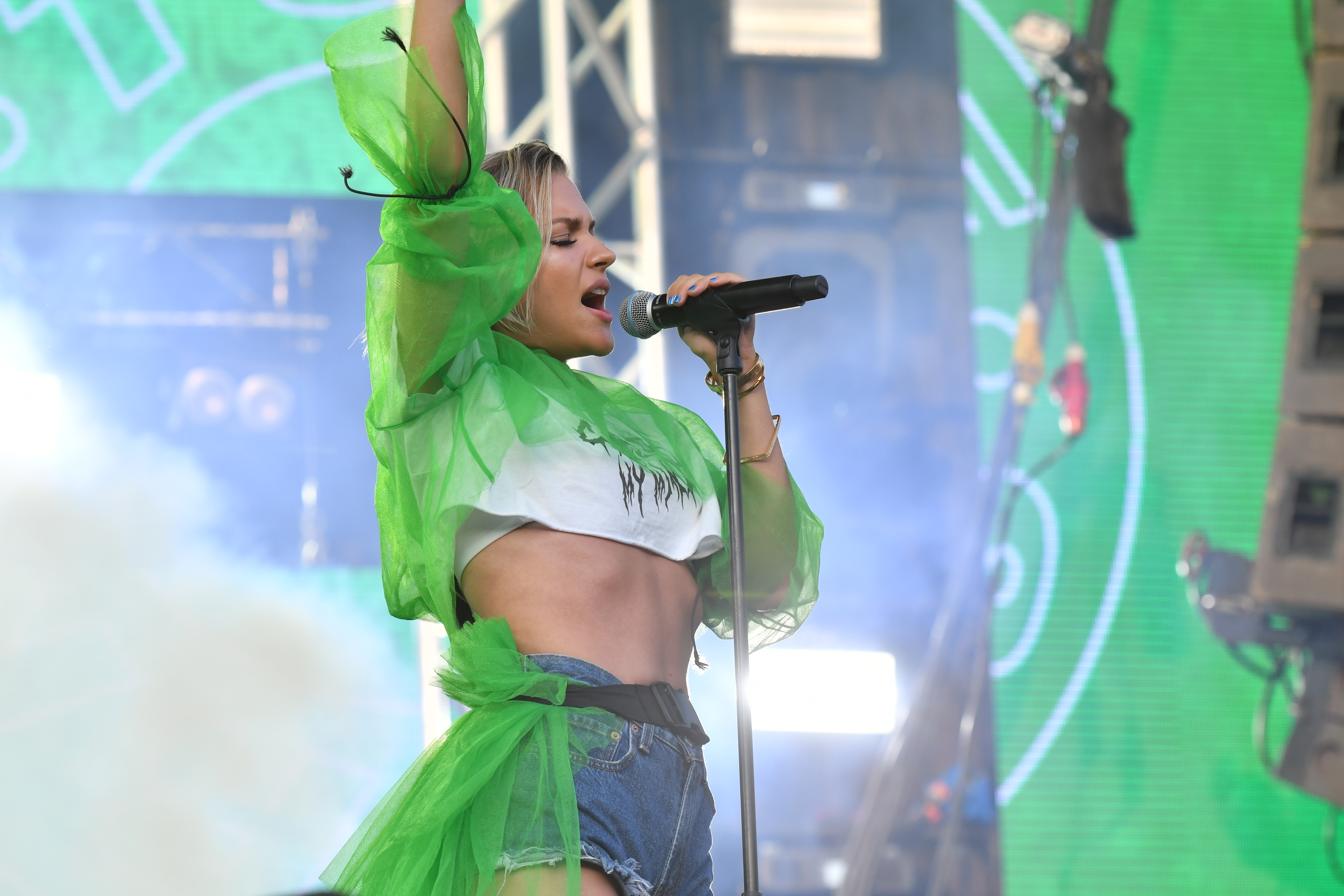 Tove Styrke på Malmöfestivalen 2018.